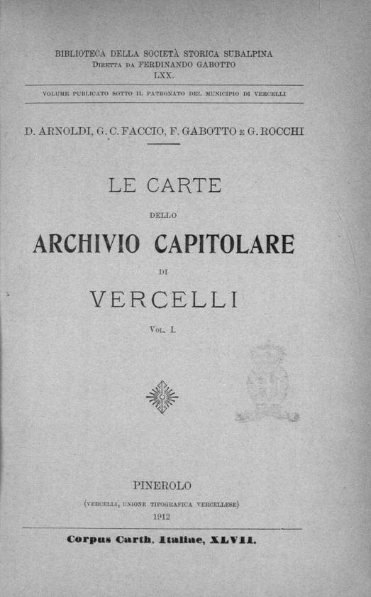 Frontespizio